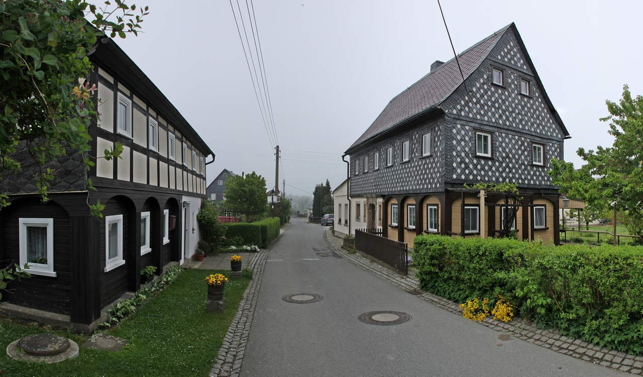 Waltersdorf (Großschönau): Blick auf das Umgebindehaus Dorfstraße 33 (Denkmal-Nr. 09270771).